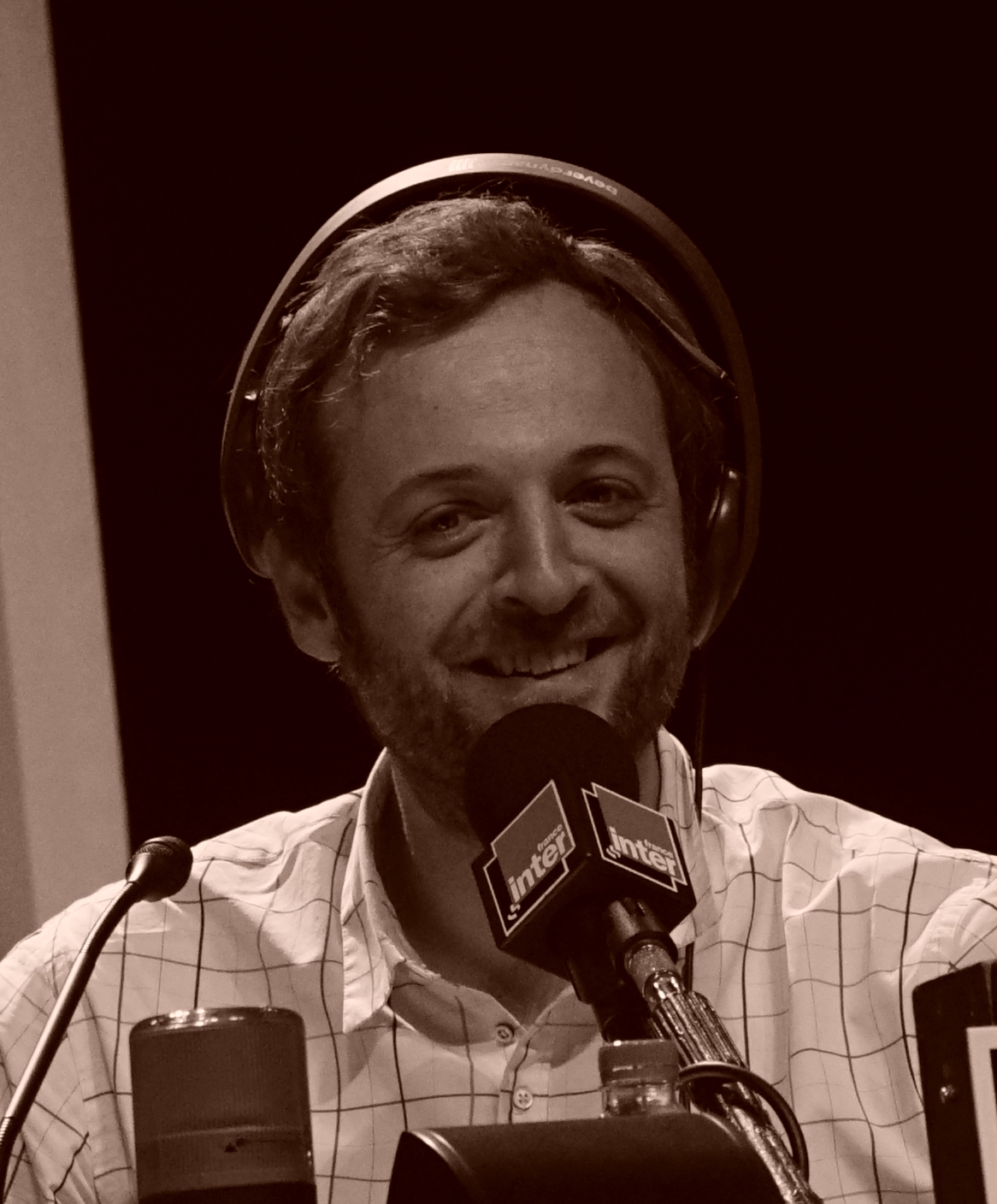 emission à Troyes.